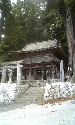 武田八幡宮